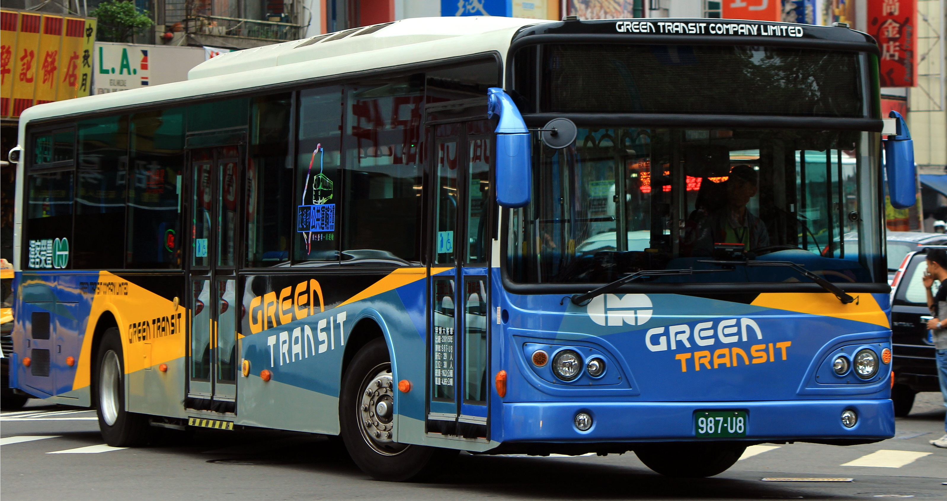 大宇五期新車